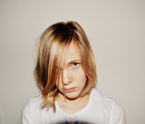 Marieke Rijneveld